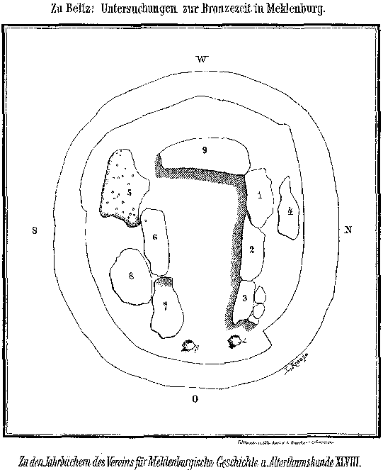 Grundrisszeichnung Großsteingrab Bollbrücke bei Parkentin anläßlich der Ausgrabung durch R. Beltz